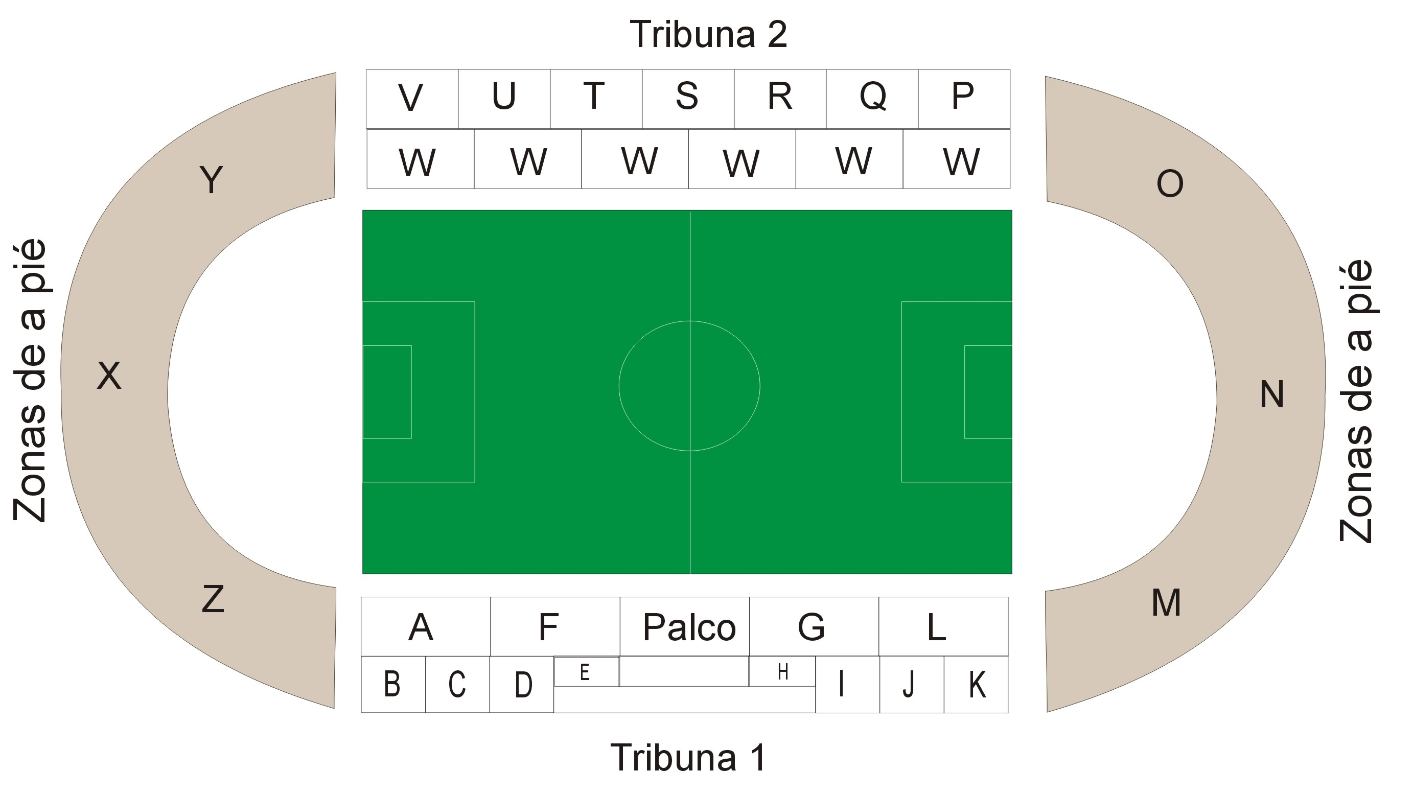 Dibujo del Estadio de Heysel, en 1985. Dibujo realizado por SergiL